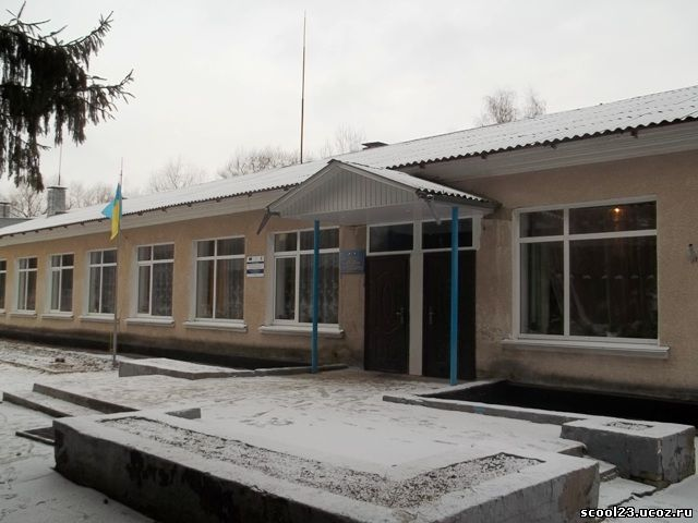 Чубинецька школа